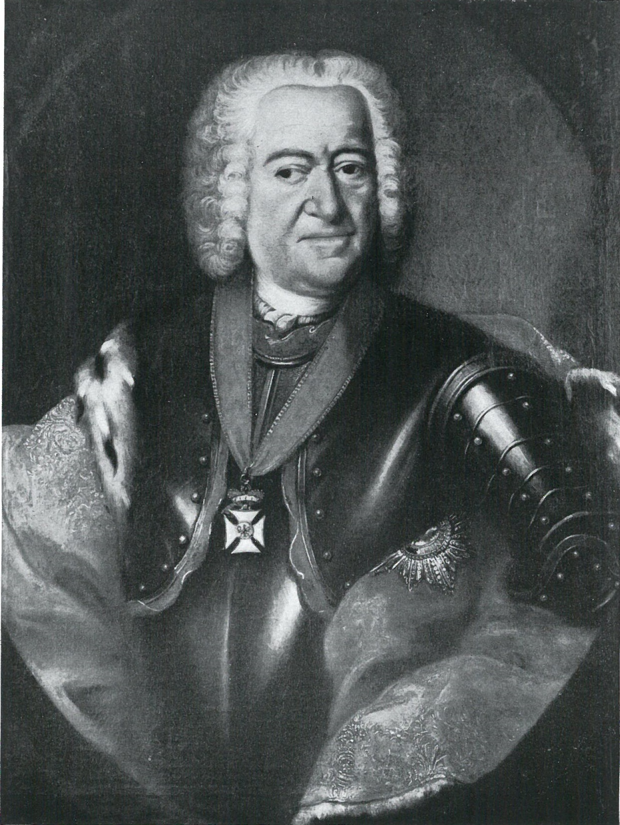 Johann Friedrich Graf und Herr zu Castell-Rüdenhausen (1675-1749). Gemälde wohl von Georg Schlütter.